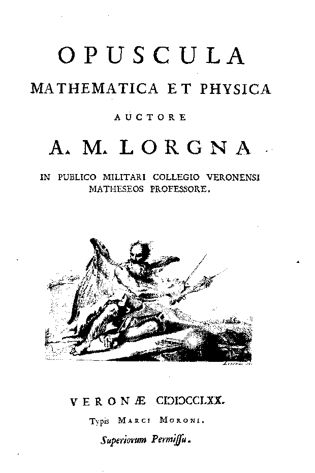 Opuscula mathematica et physica auctore A.M. Lorgna in publico militari collegio Veronensi matheseos professore. - Veronae : typis Marci Moroni, 1770. - [8], 98, [2] p., [2] c. di tav. ripiegate : ill. calcografiche ; 4º .